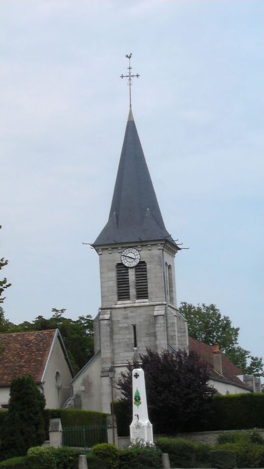 photo clocher de TANAY 21